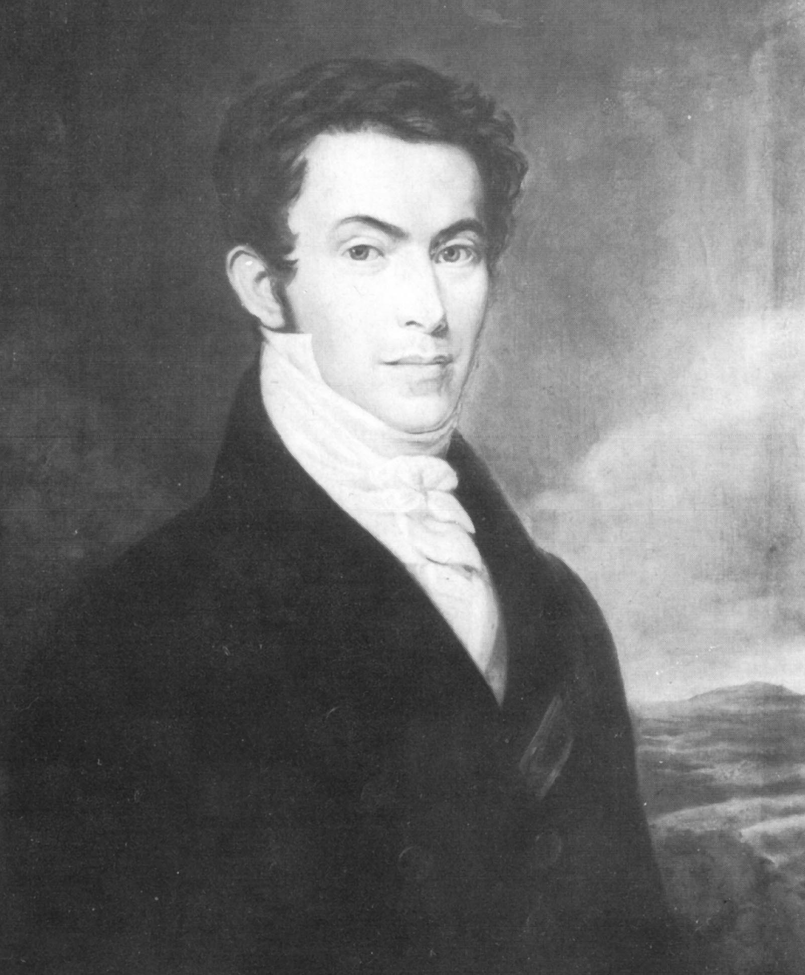 Hans Adolf von Plessen, Mecklenbg. Wirkl. Geh. Rat und Oberkammerherr, Excellenz, Ritter des Johanniter-Ordens und des schwedischen Schwert-Ordens Datum: um 1830 Quelle: Buch "Die Plessen", C.A. Starke Verlag, Limburg, 1971 Urheber: Unbekannter Portaitmaler